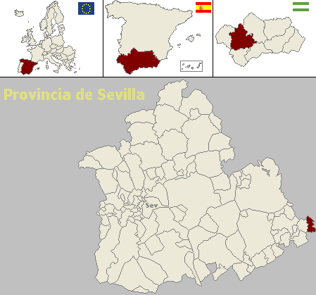 Mapa de localización del municipio sevillano de Badolatosa (Andalucía, España)